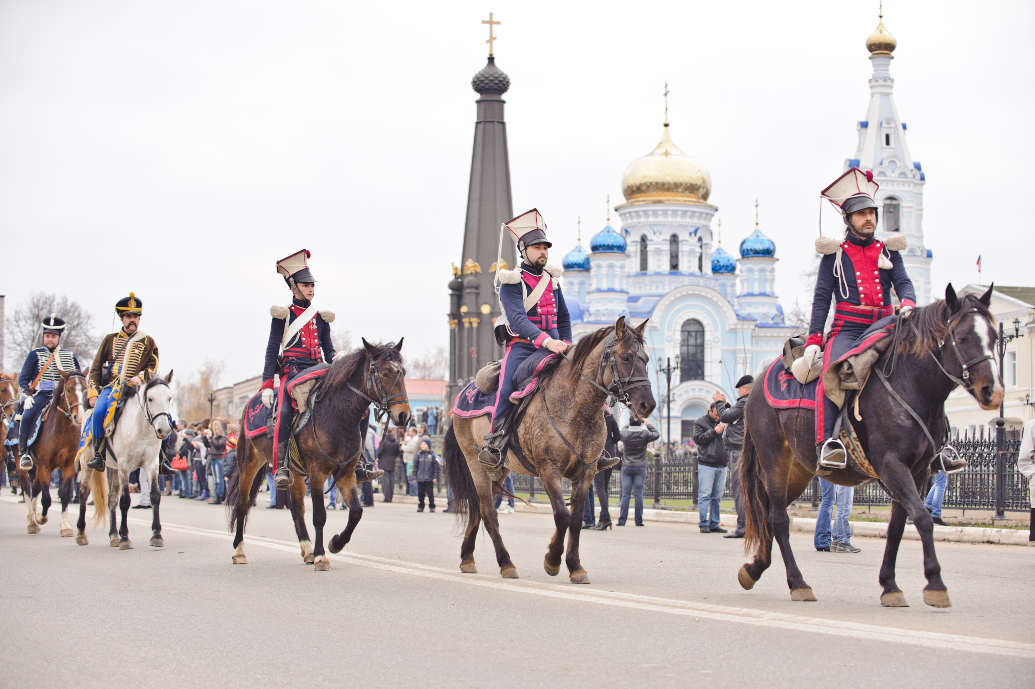 Реконструкция Малоярославецкого сражения